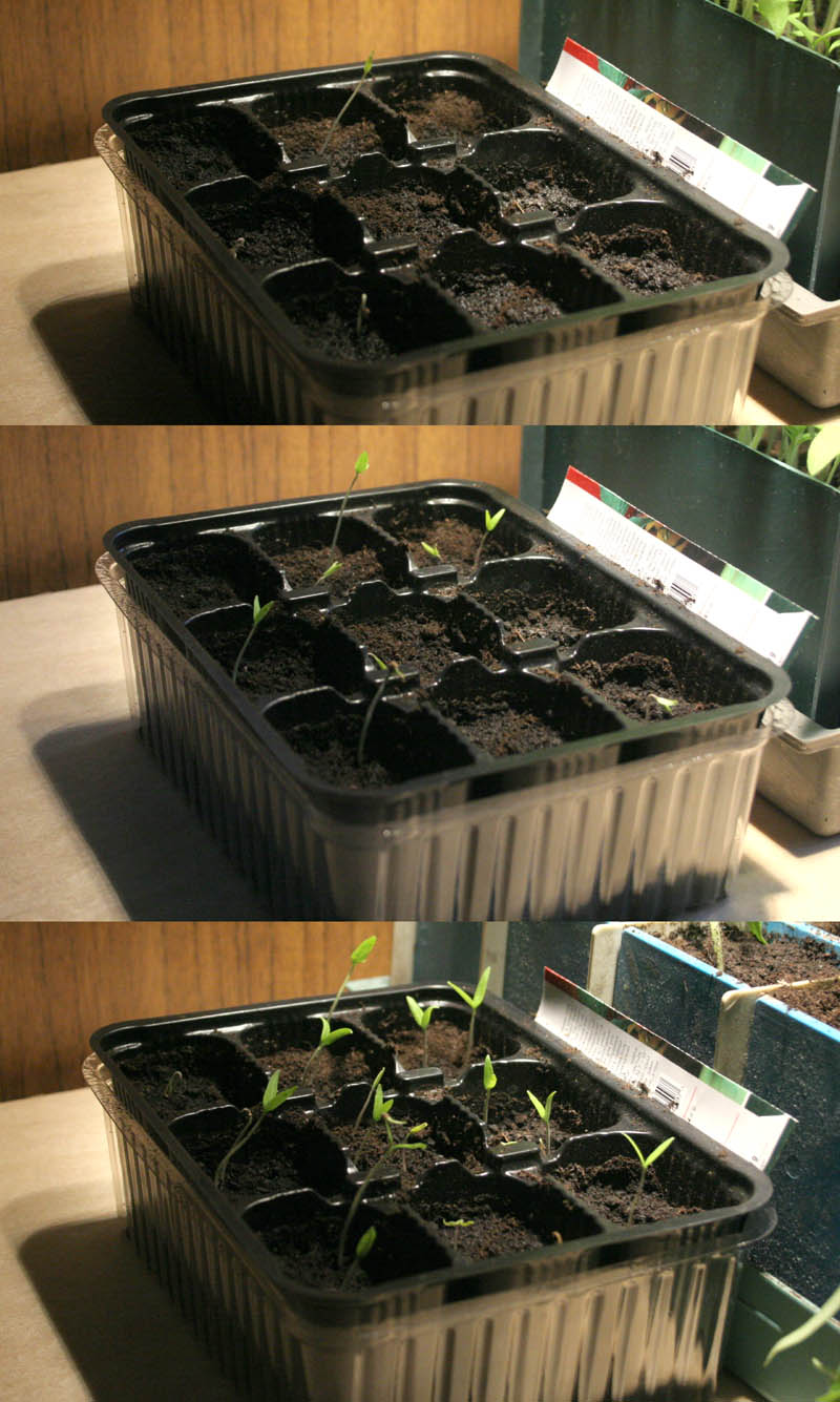 Всходящая рассада помидоров. Снимки сделаны с интервалом в одни сутки 18, 19 и 20 марта